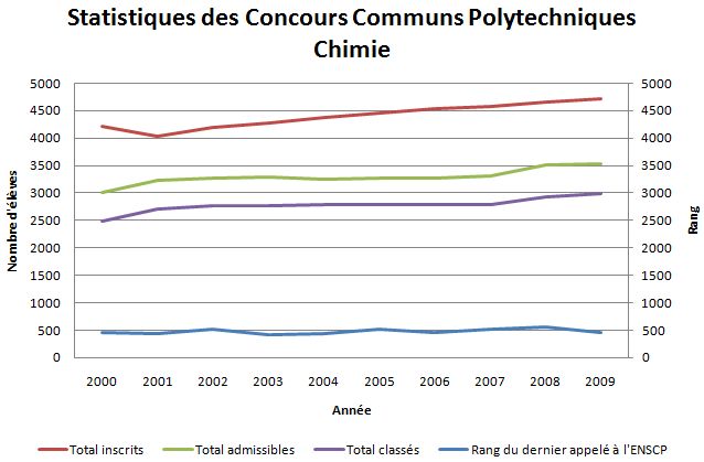 Statistiques CCP Chimie pour ENSCP